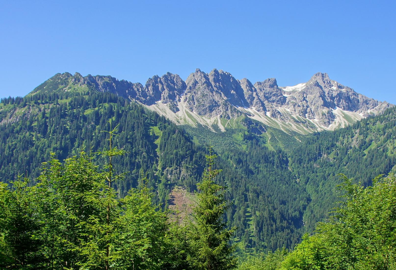 Mittagspitze, Pfannenhölzer und Kleiner Daumen von oberhalb des Hinteren Dorfs bei Hinterstein.